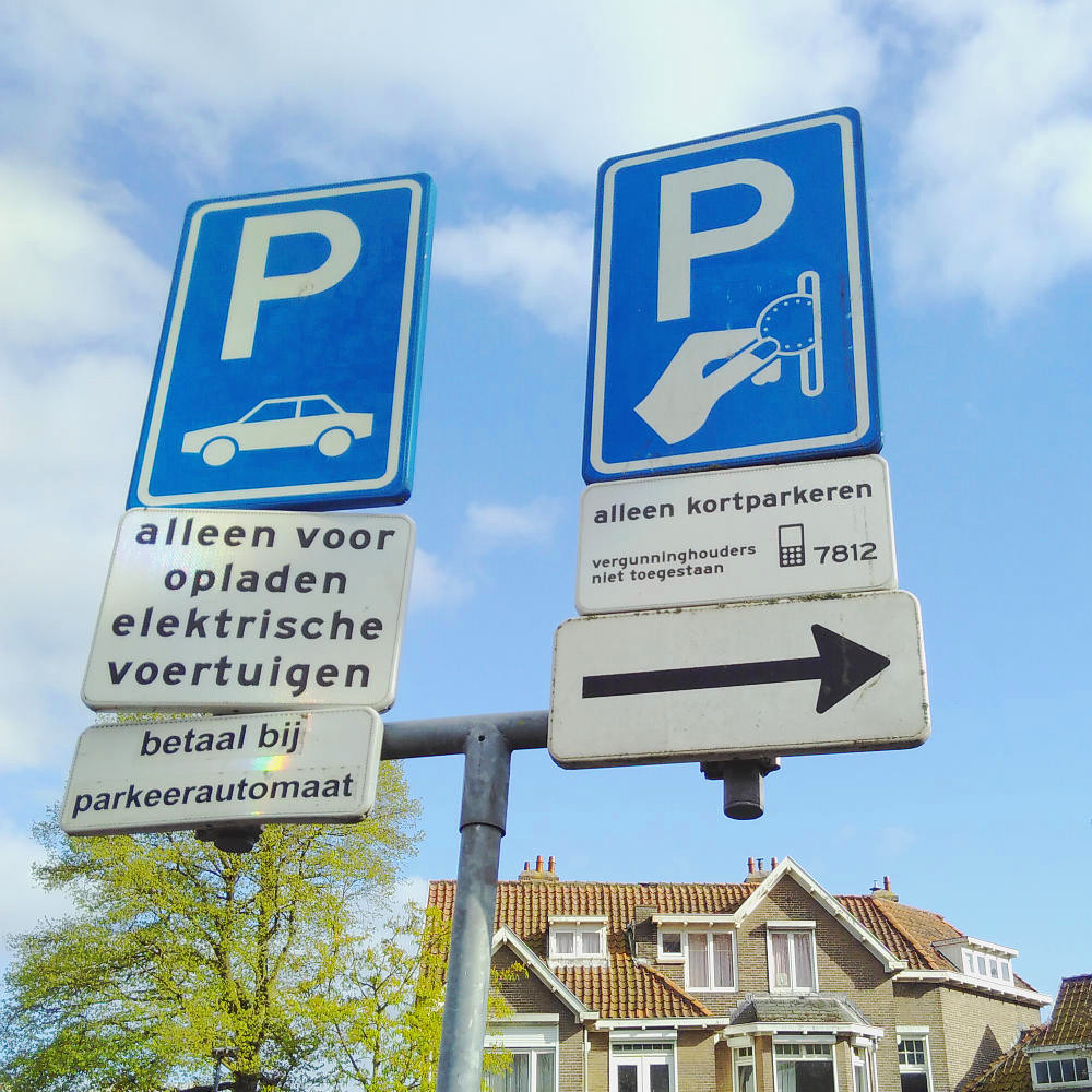 Alleen opladen voor elektrische voertuigen; betalen bij parkeerautomaat